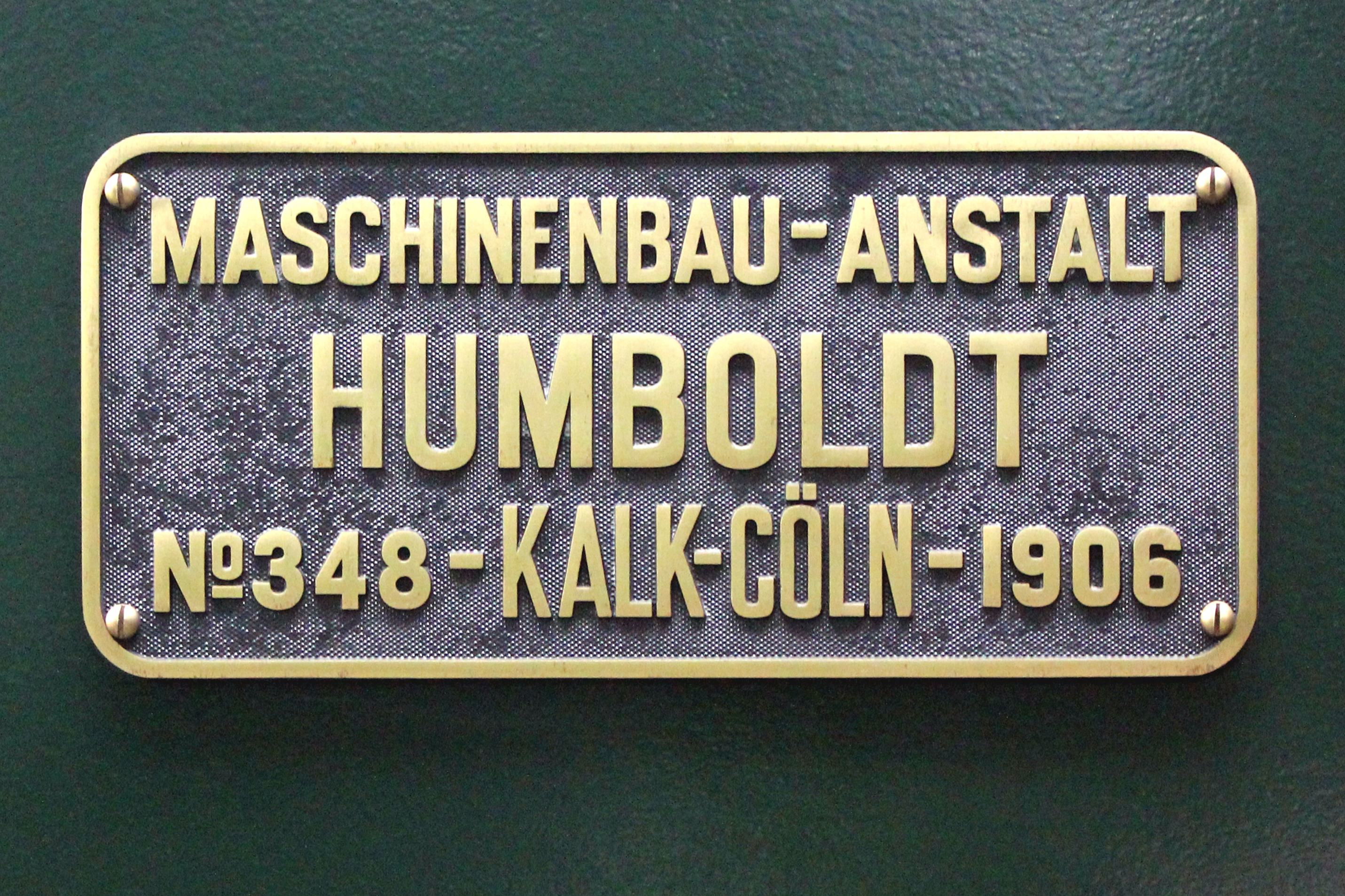 Typenschild der Mallet-Lokomotive der Brohltalbahn, 1906 von der Maschinenfabrik Humboldt in Köln-Kalk gebaut, Nr. 348, nach der letzten Fahrt vom 29. Januar 1966 stillgelegt und von November 2008 bis Februar 2015 restauriert, erste planmäßige Fahrt danach am 1. Mai 2015